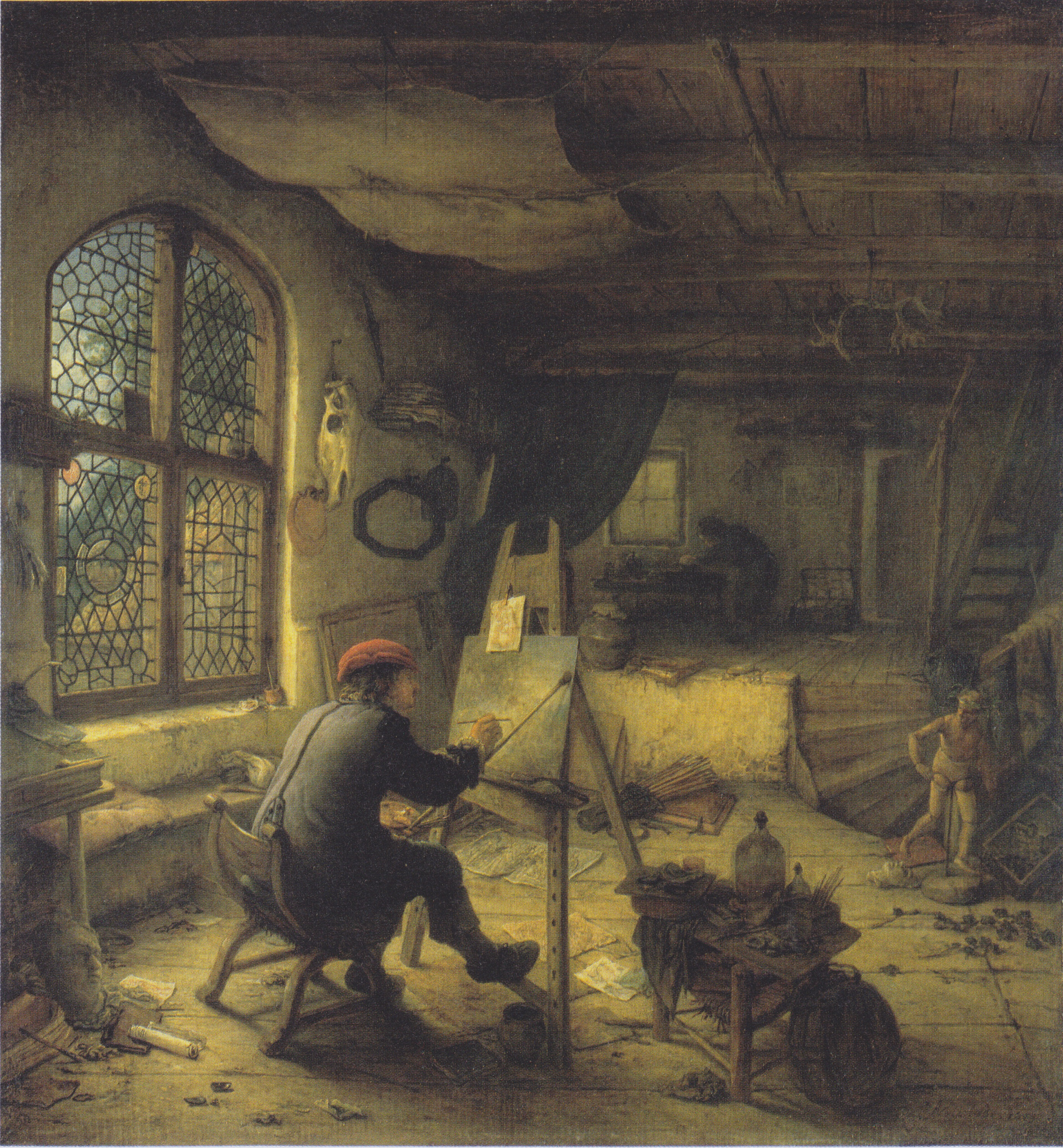 Self-portrait